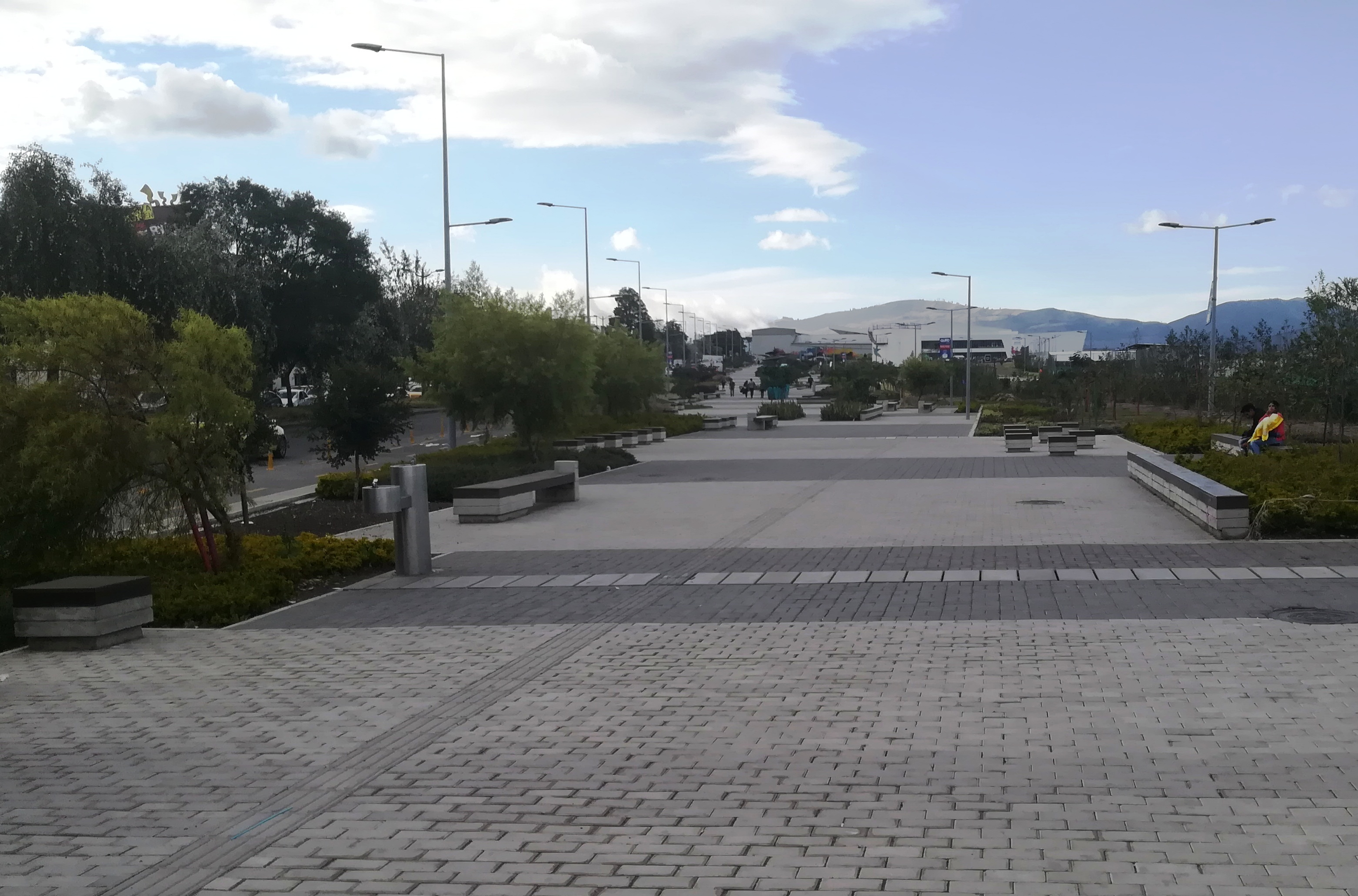 Bulevar Amazonas del Parque Bicentenario, en Quito, visto desde la avenida Isaac Albéniz hacia el norte (2018).